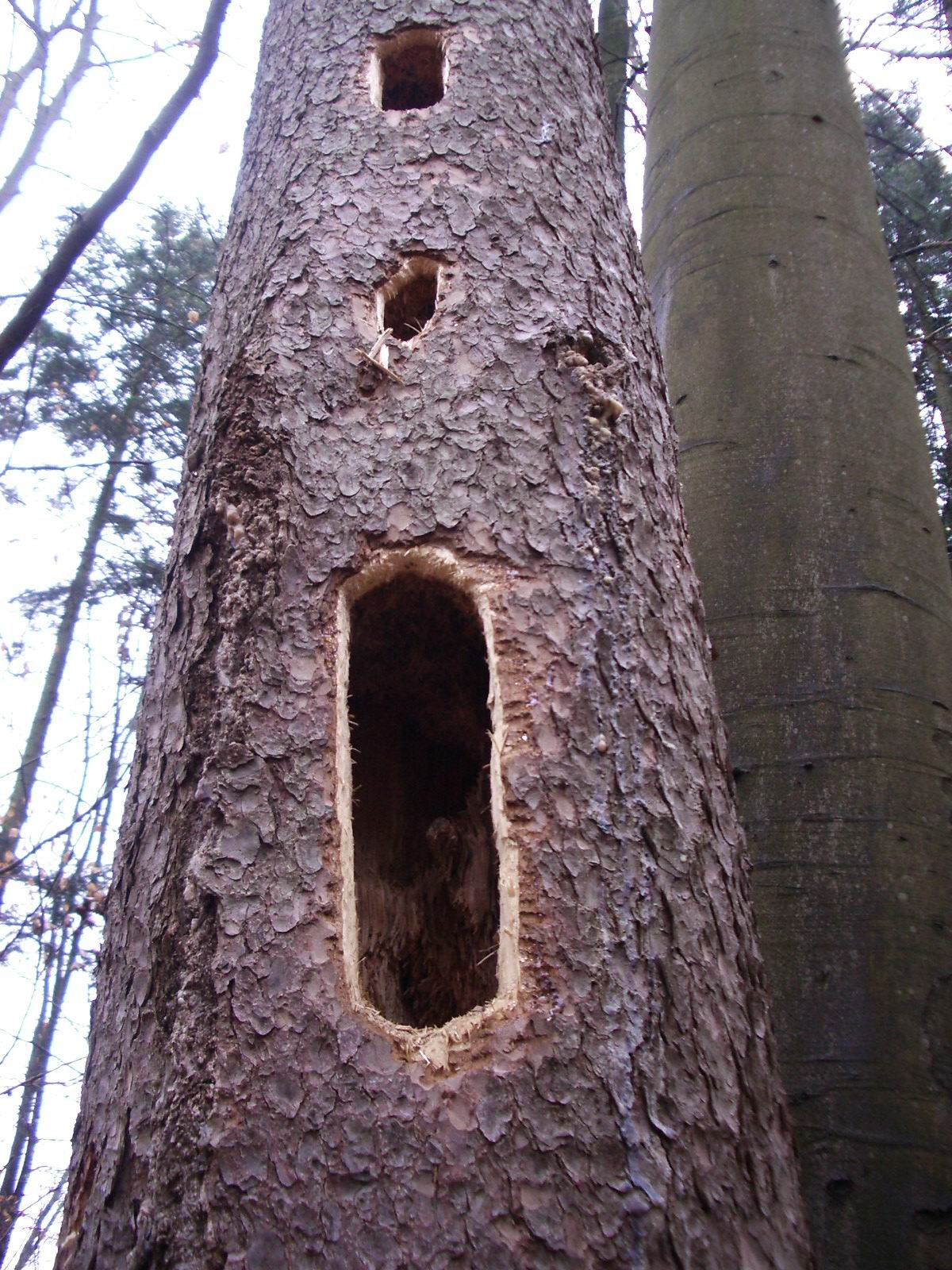 Spechtloch, Switzerland self-made, March 2006